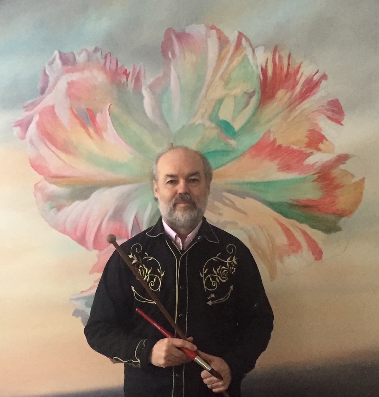 Portrait Genia Chef